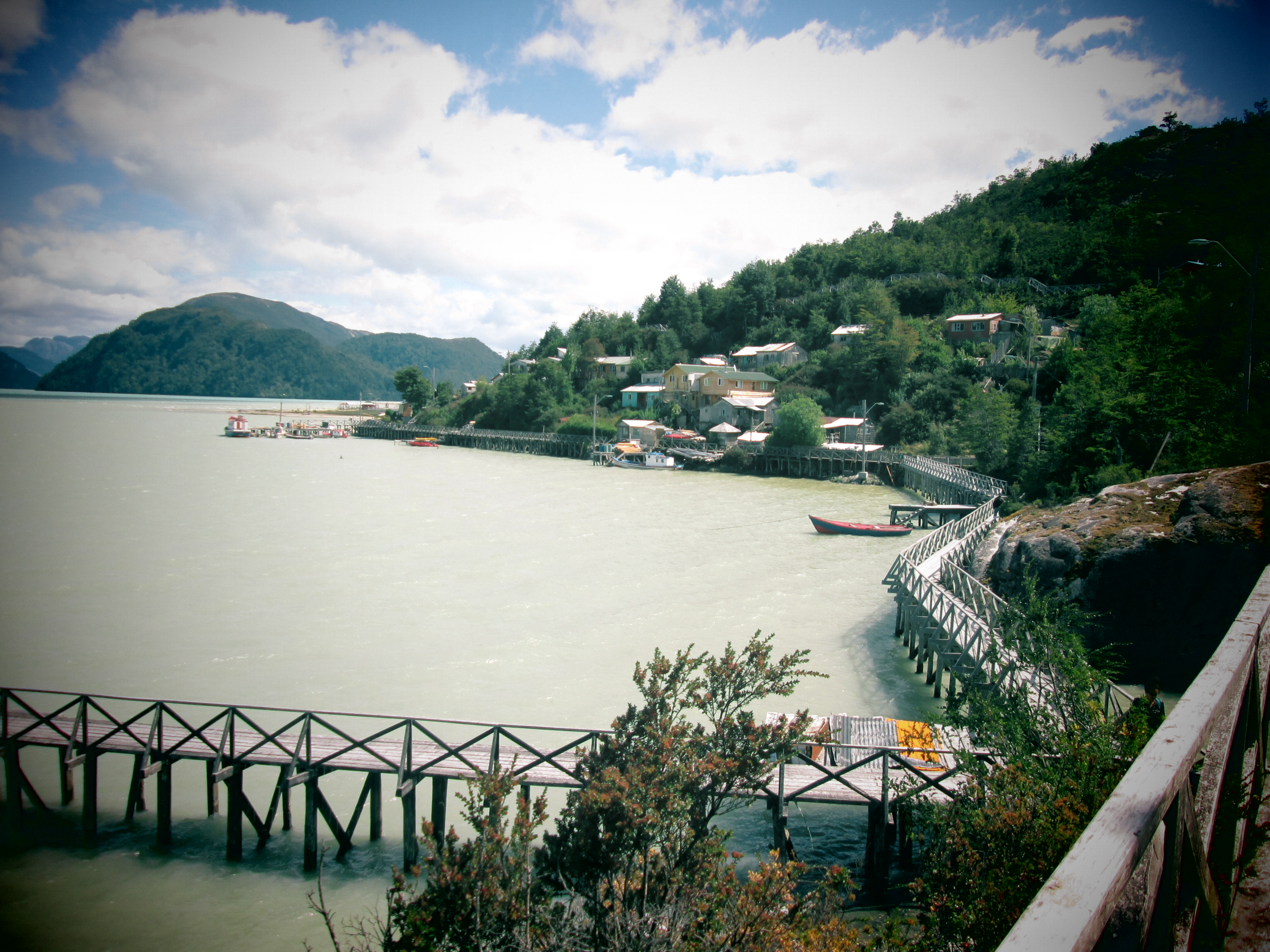 Pasarelas de Caleta Tortel, región de Aysén.